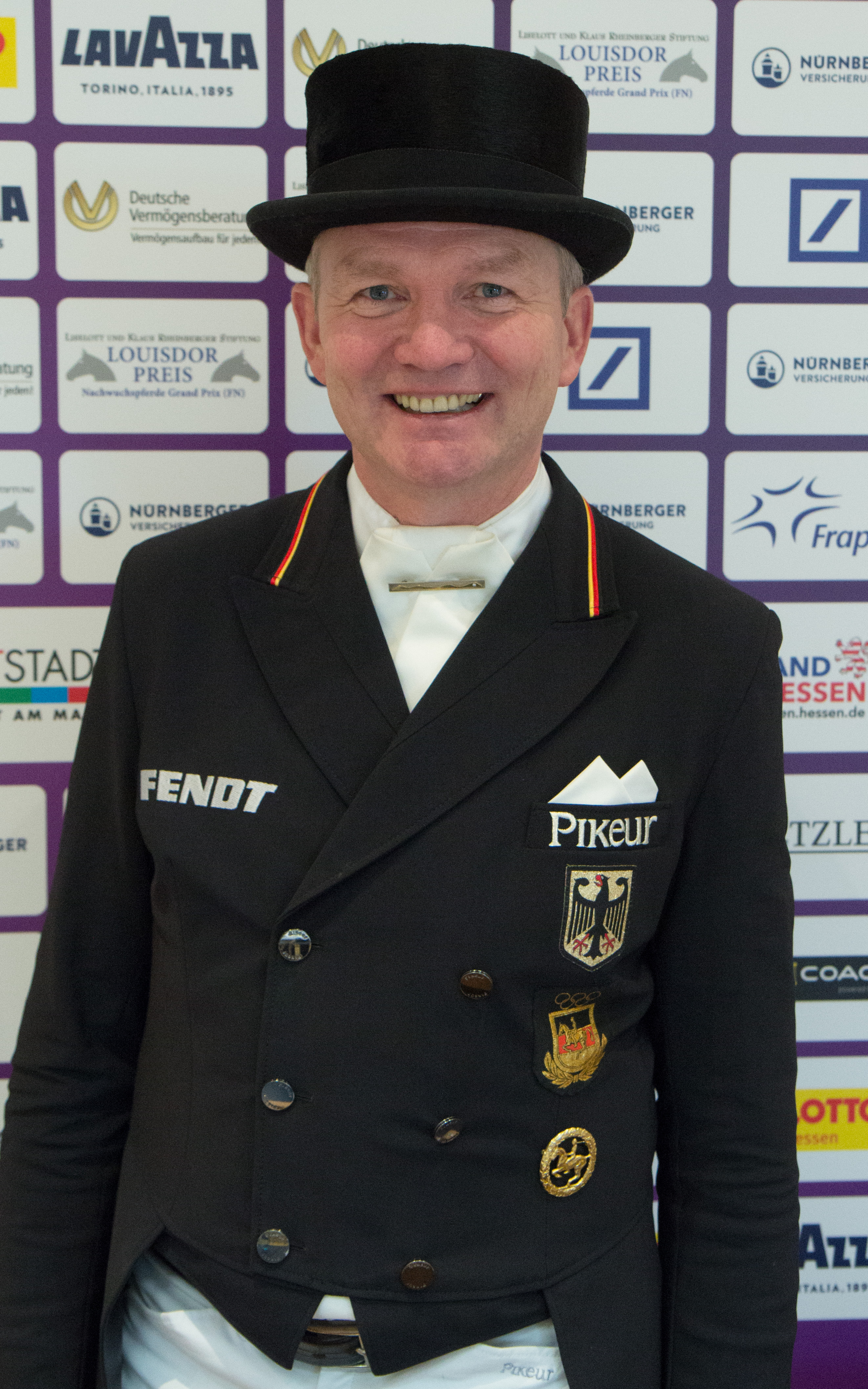 Internationales Festhallen Reitturnier 2017 in Frankfurt. Hubertus Schmidt